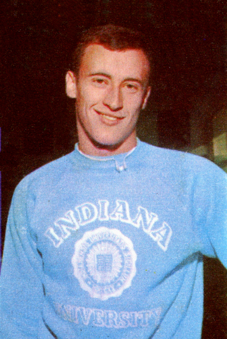 CAMPIONI DELLO SPORT 1967/68-n.329 - BOSCAINI - NUOTO